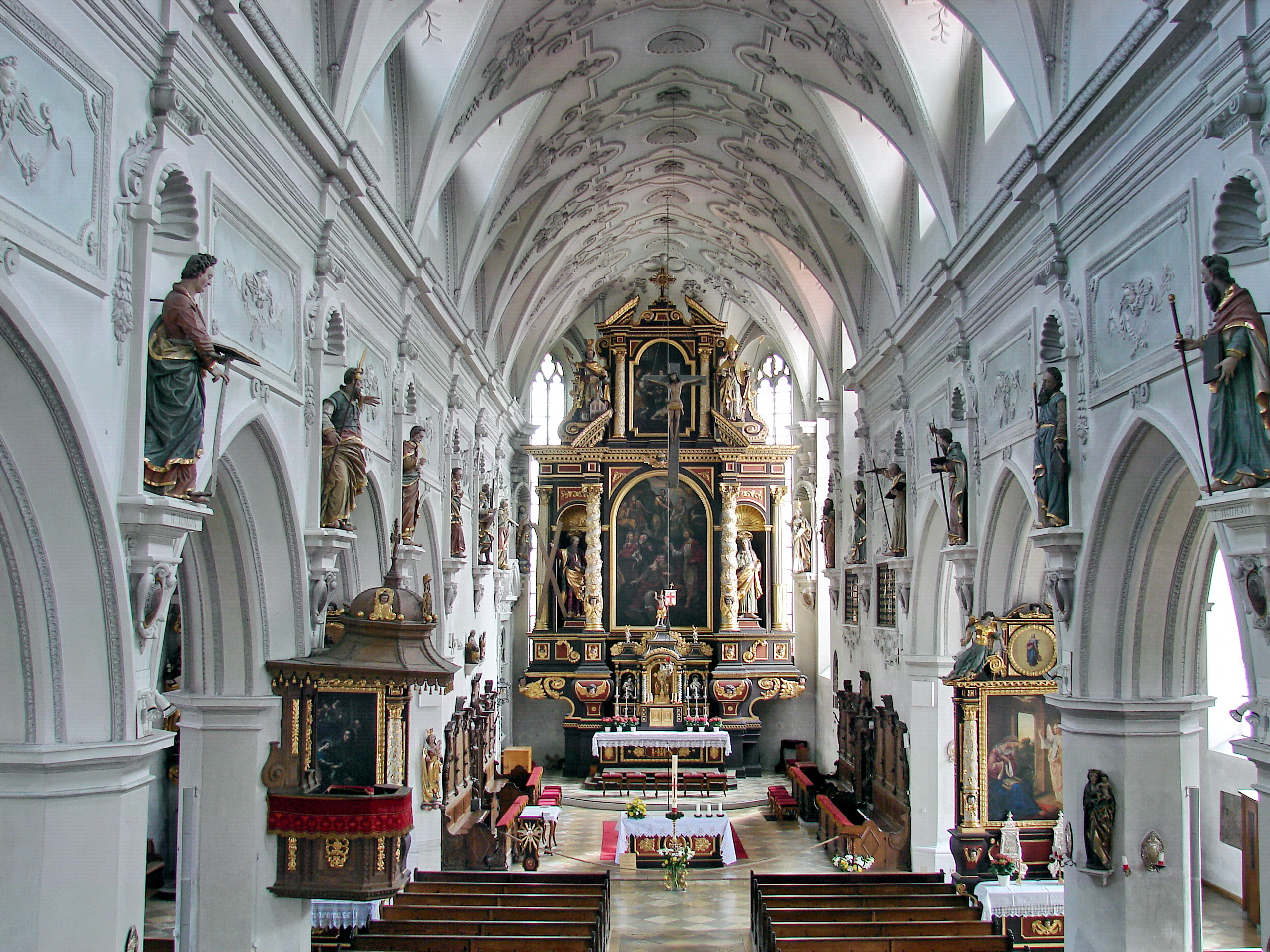 Stadtpfarrkirche St. Johannes Baptist ist die katholische Stadtpfarrkirche von Pfaffenhofen an der Ilm.